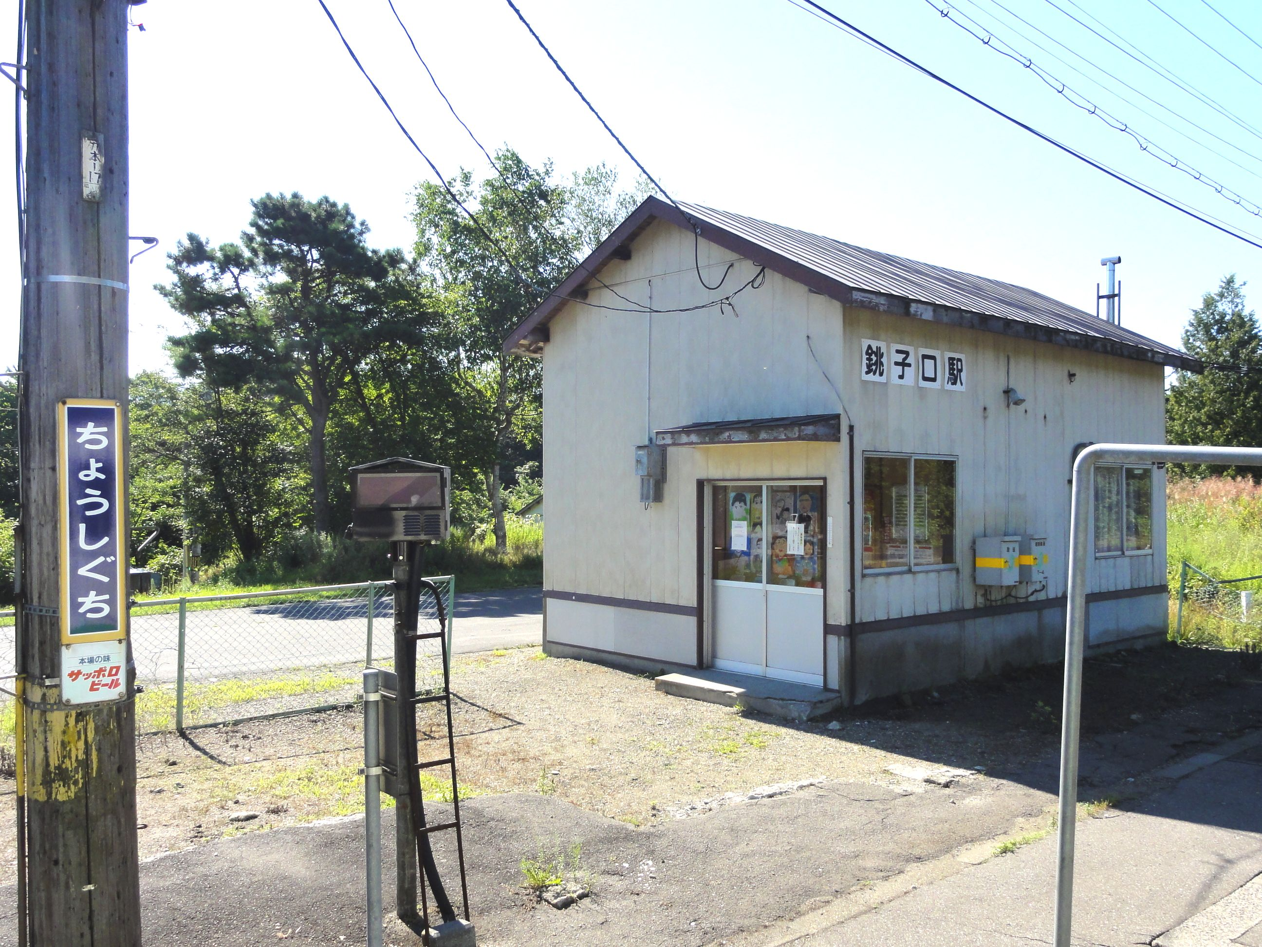 JR北海道銚子口駅待合室